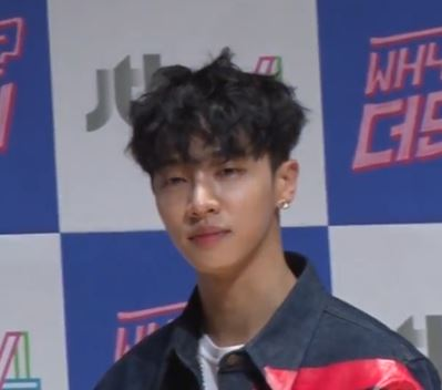 디스패치 구독 클릭! Dispatch Subscribe